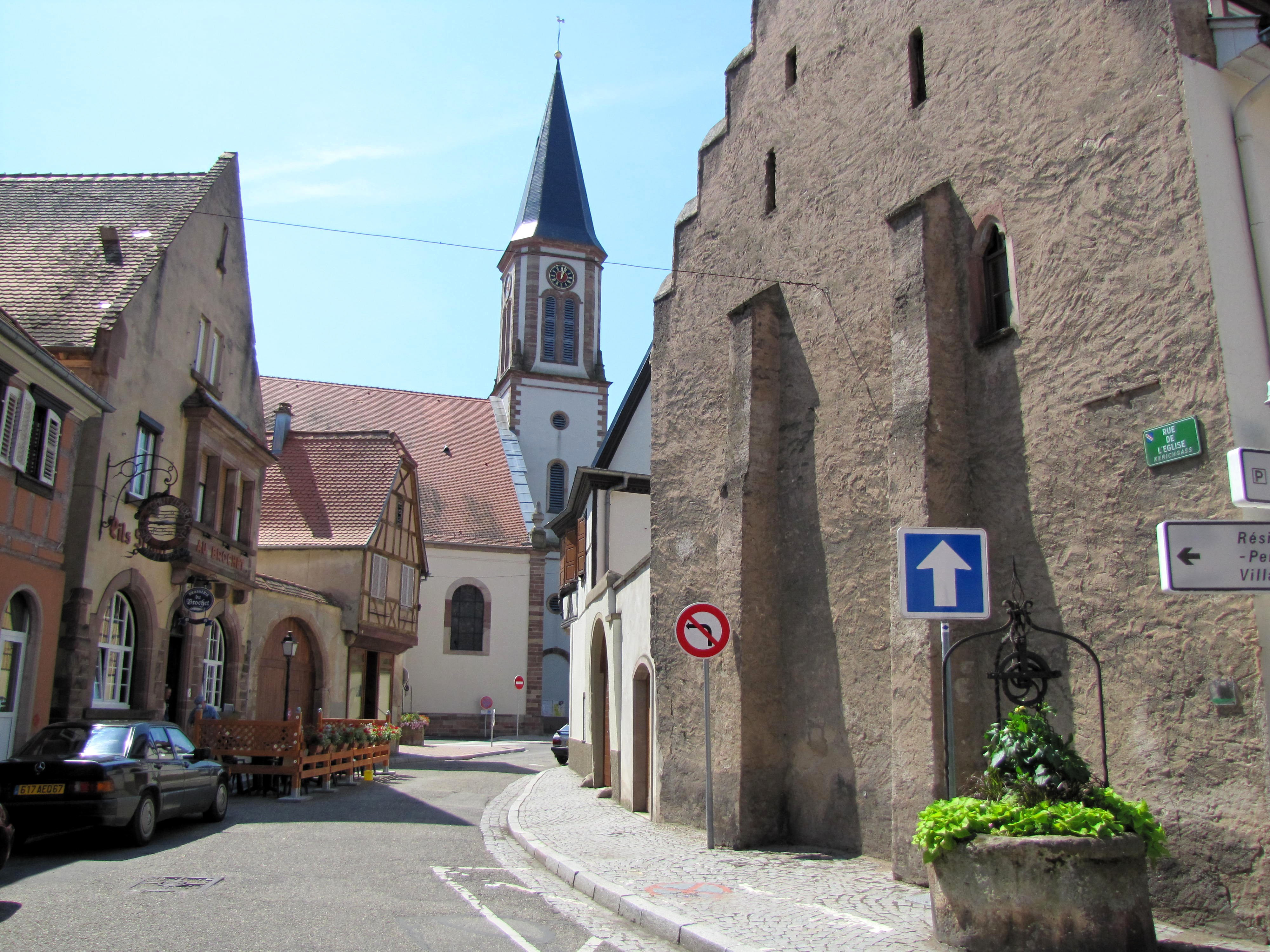 Alsace, Bas-Rhin, Benfeld, Rue de l'Église.